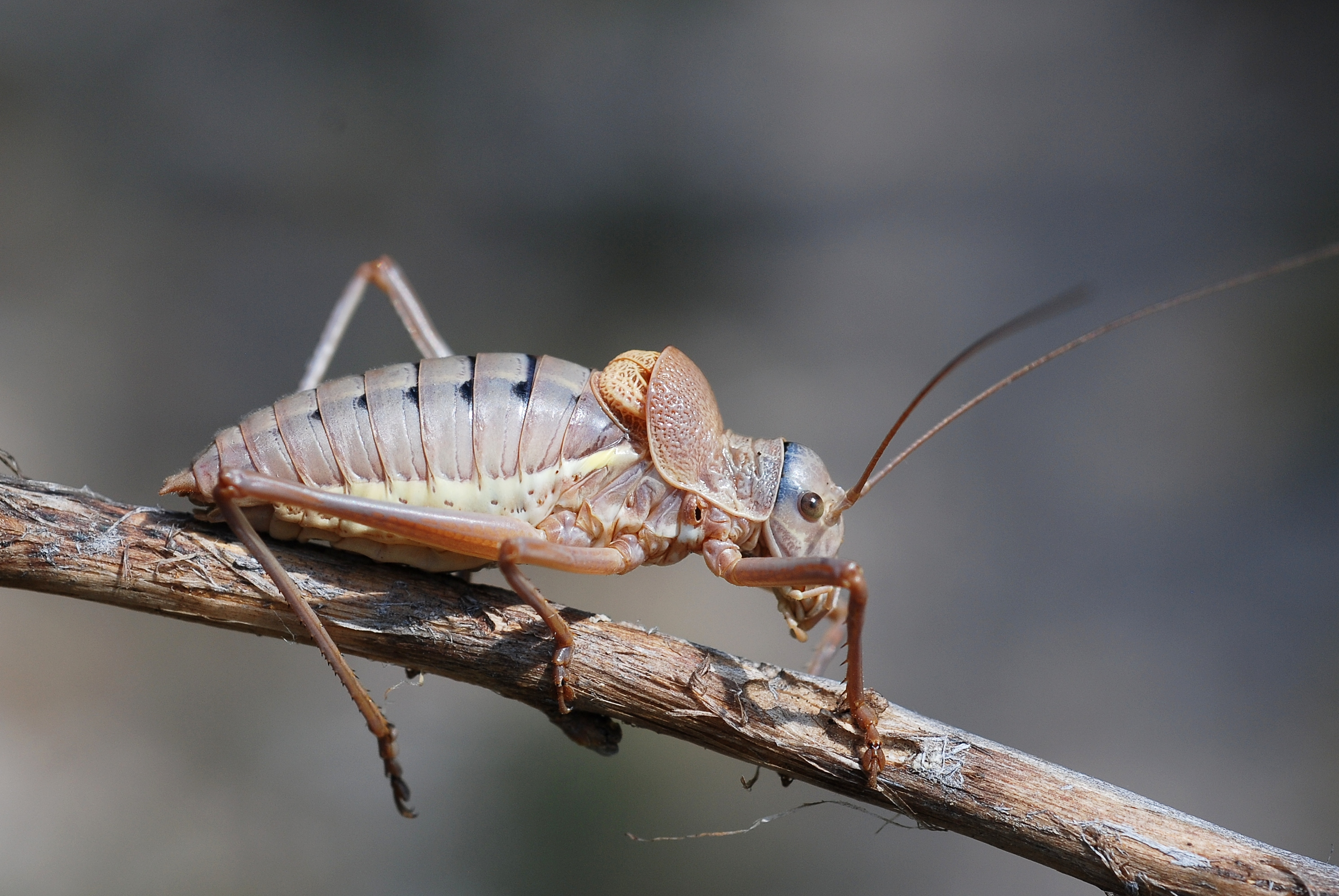 Ephipiger cfr terrestris